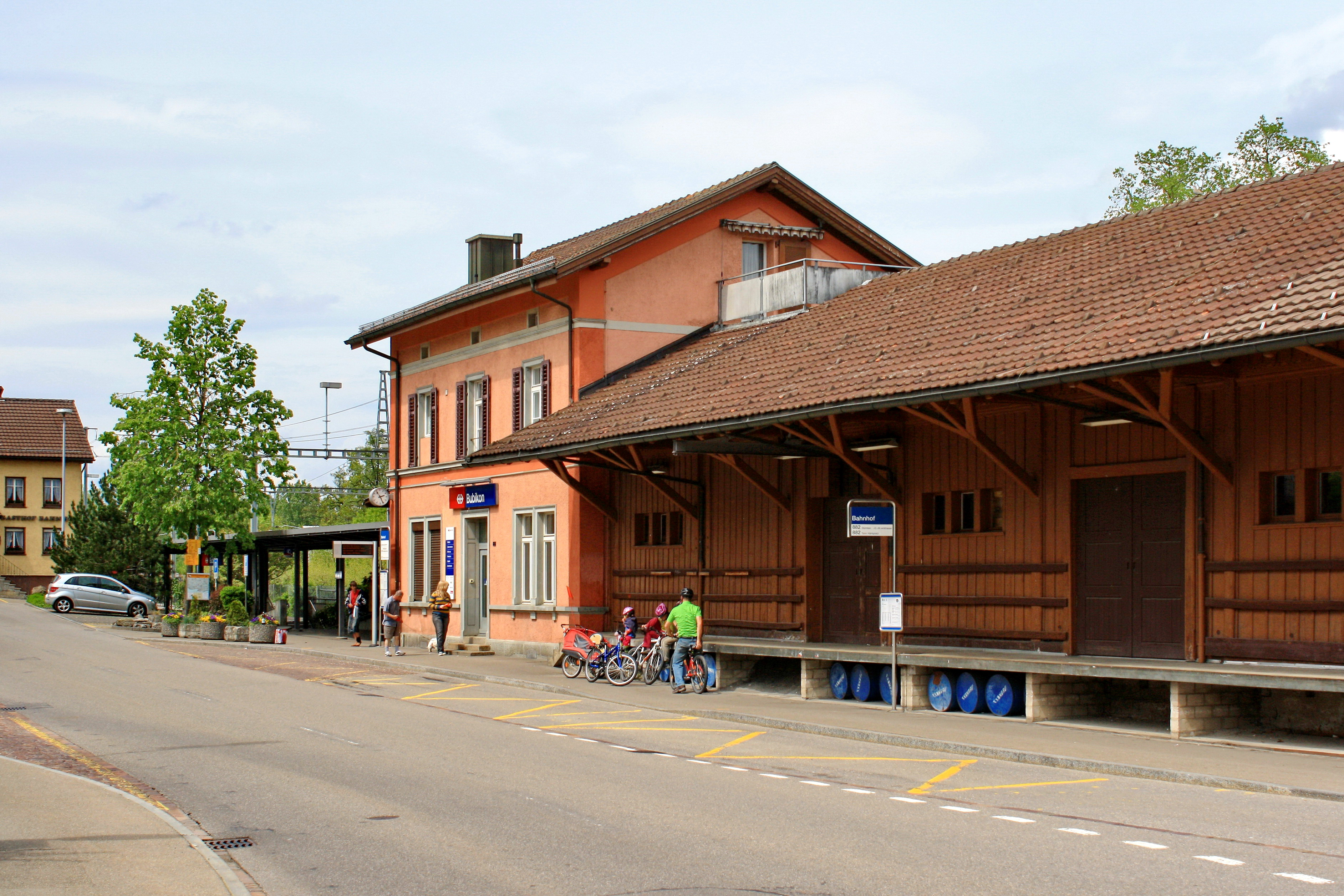 Bubikon (Switzerland)